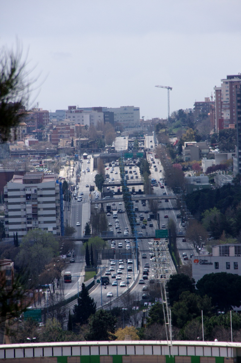 Ronda de Dalt al seu pas per la Vall d'Hebron